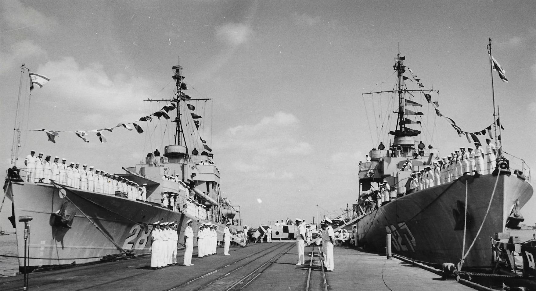 ראש הממשלה מבקר את האוניות שחזרו ממשימת הסיוע לאיי יוון.